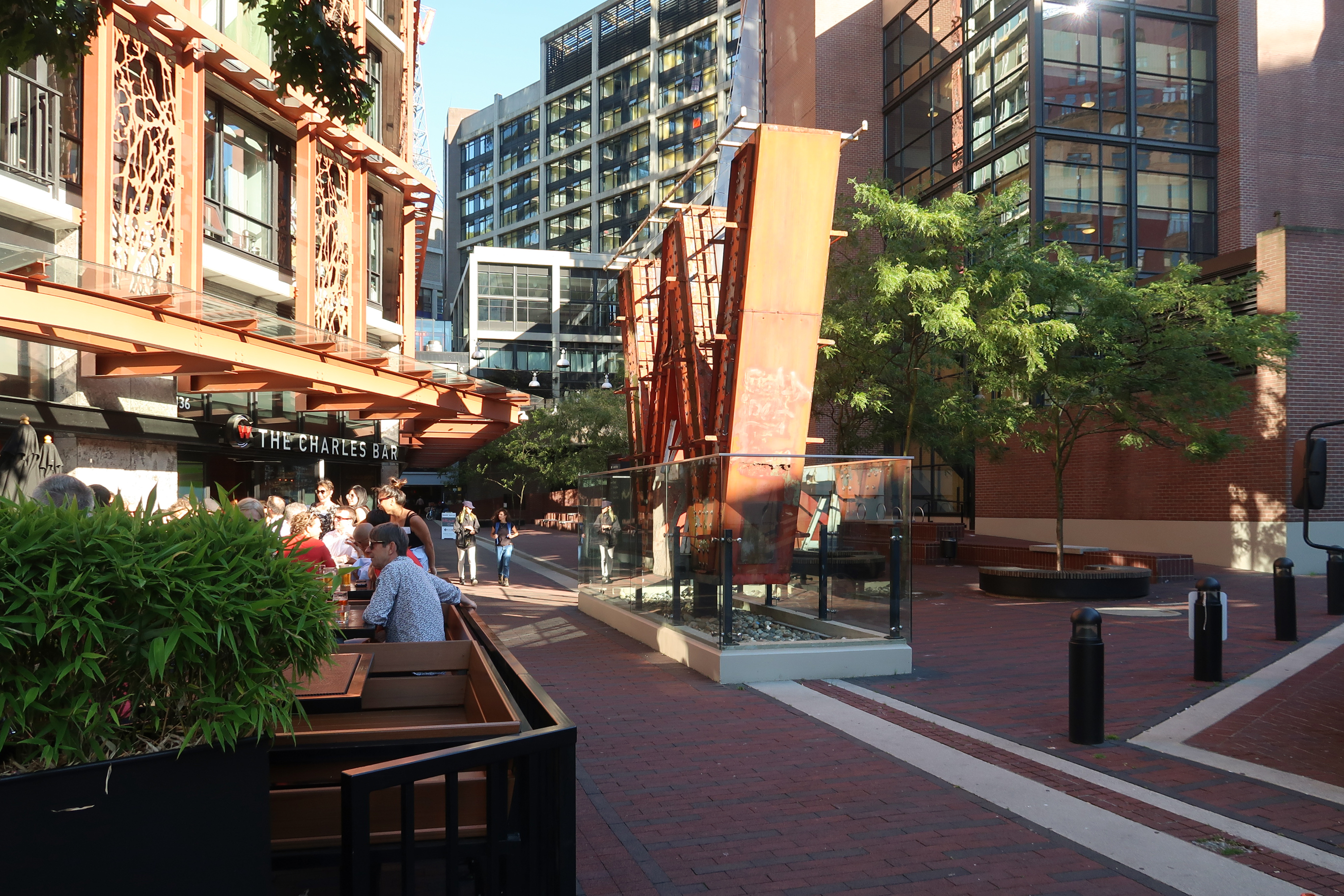 Woodward's